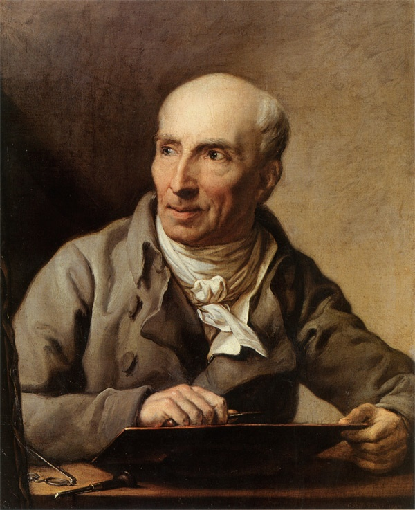 Portrait of Johann Friedrich Bause (1738-1814)